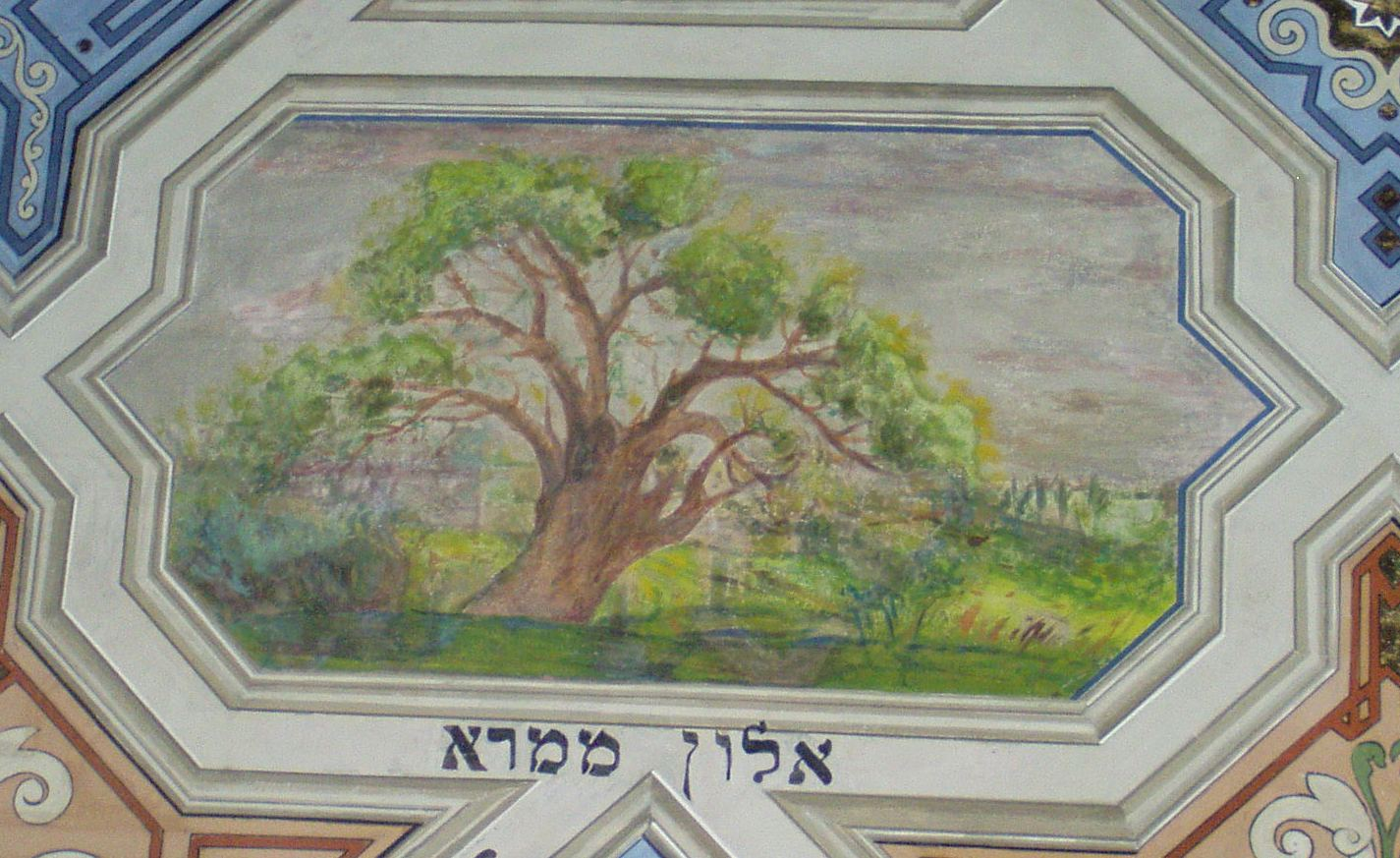 Sceny biblijne na stropie synagogi Kupa w Krakowie